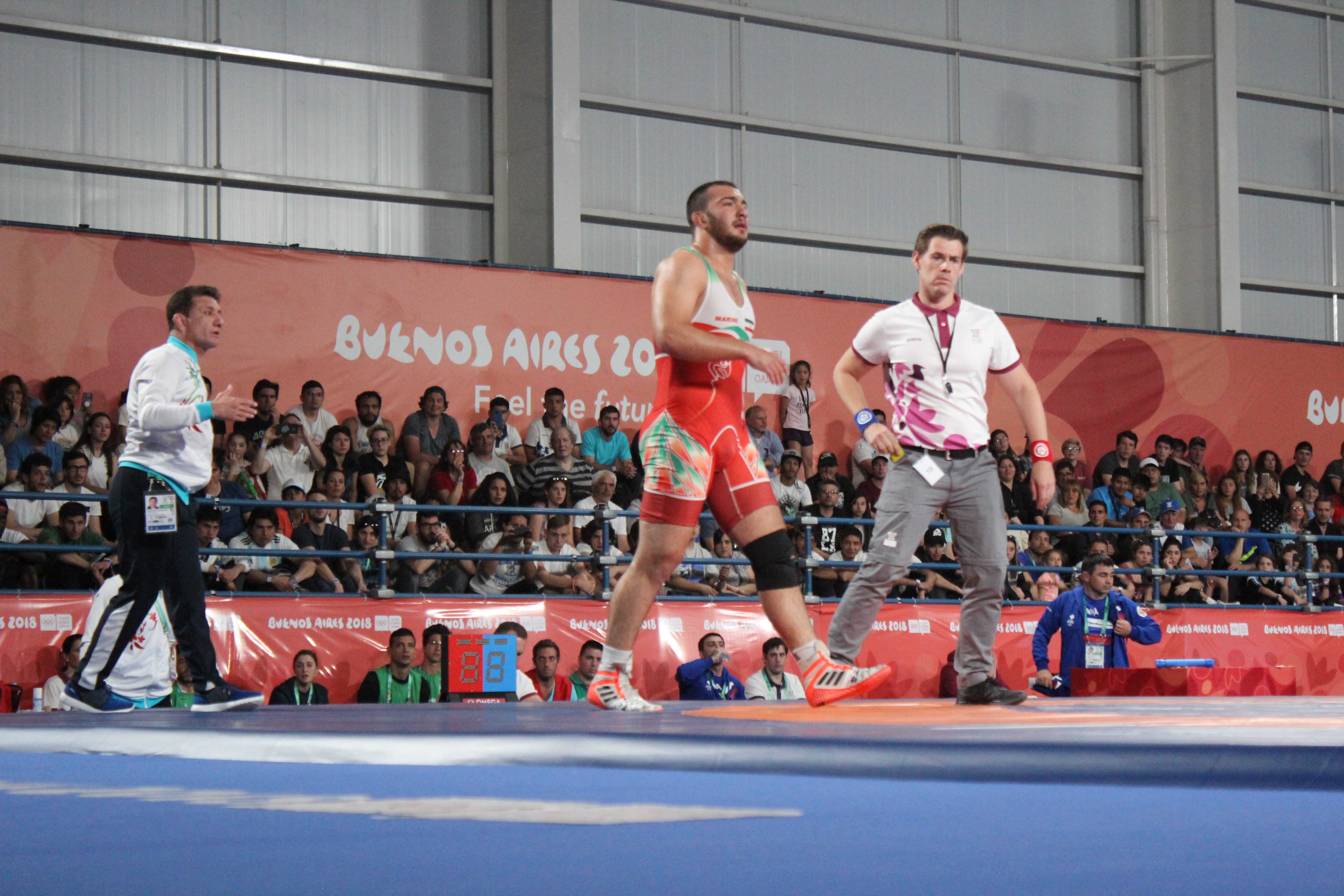 Lucha - estilo libre masculino. JJOO de la Juventud Buenos Aires 2018.